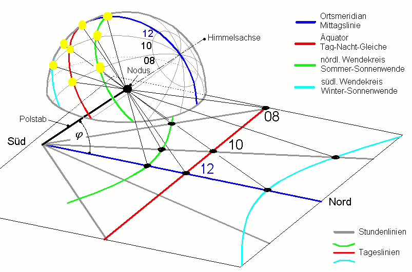 Sonnenbahnen und Stundenkreise der Sonne (inkl. Ortsmeridian) gnomonisch projiziert